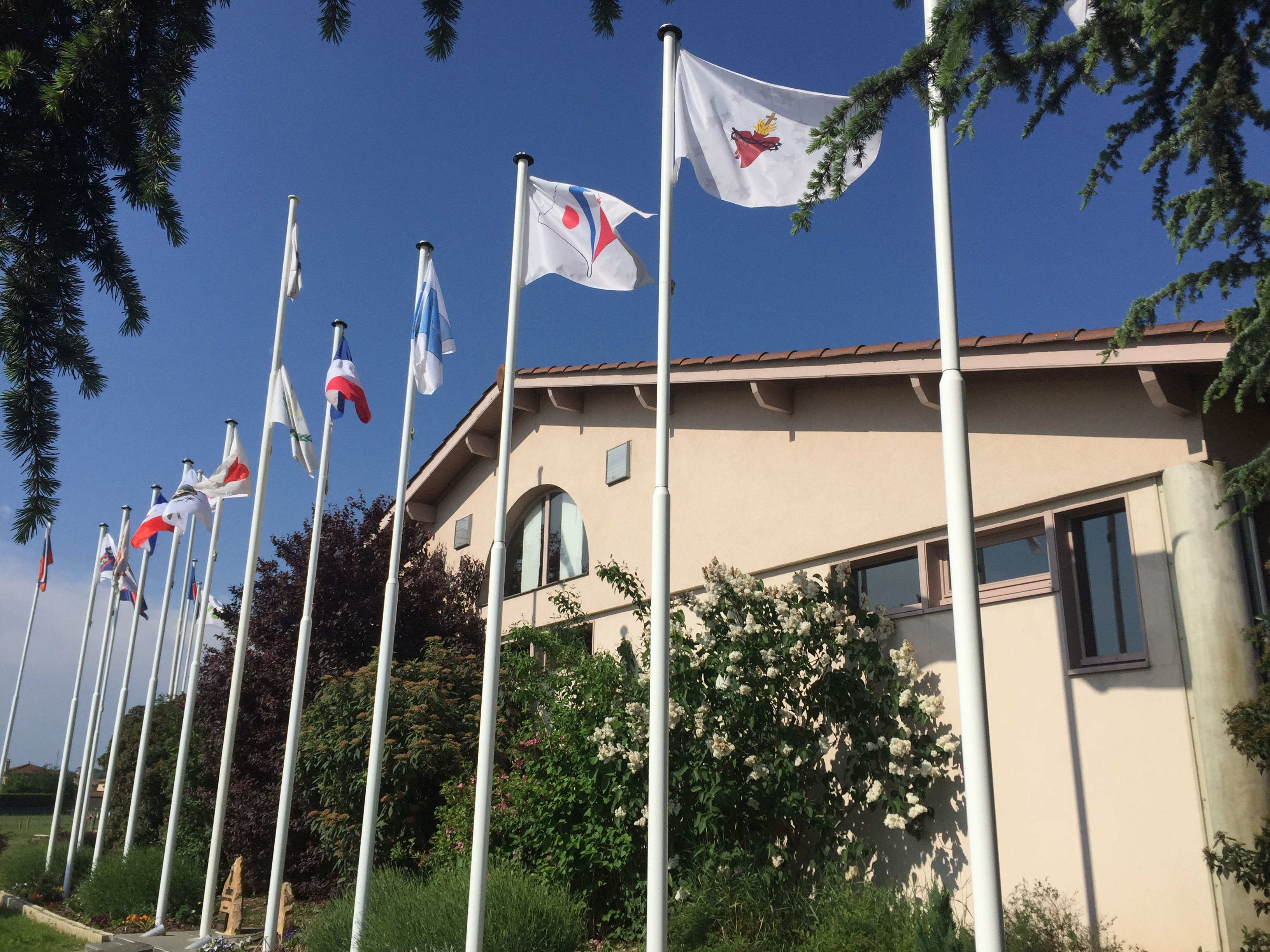 Au cœur de la Commune de Gleizé le Mémorial Heiho Niten Ichi Ryu dedié à la Vierge Marie, est une institution officalisée par la France, le Japon, le Cambodge, l'ASEAN et la Russie.